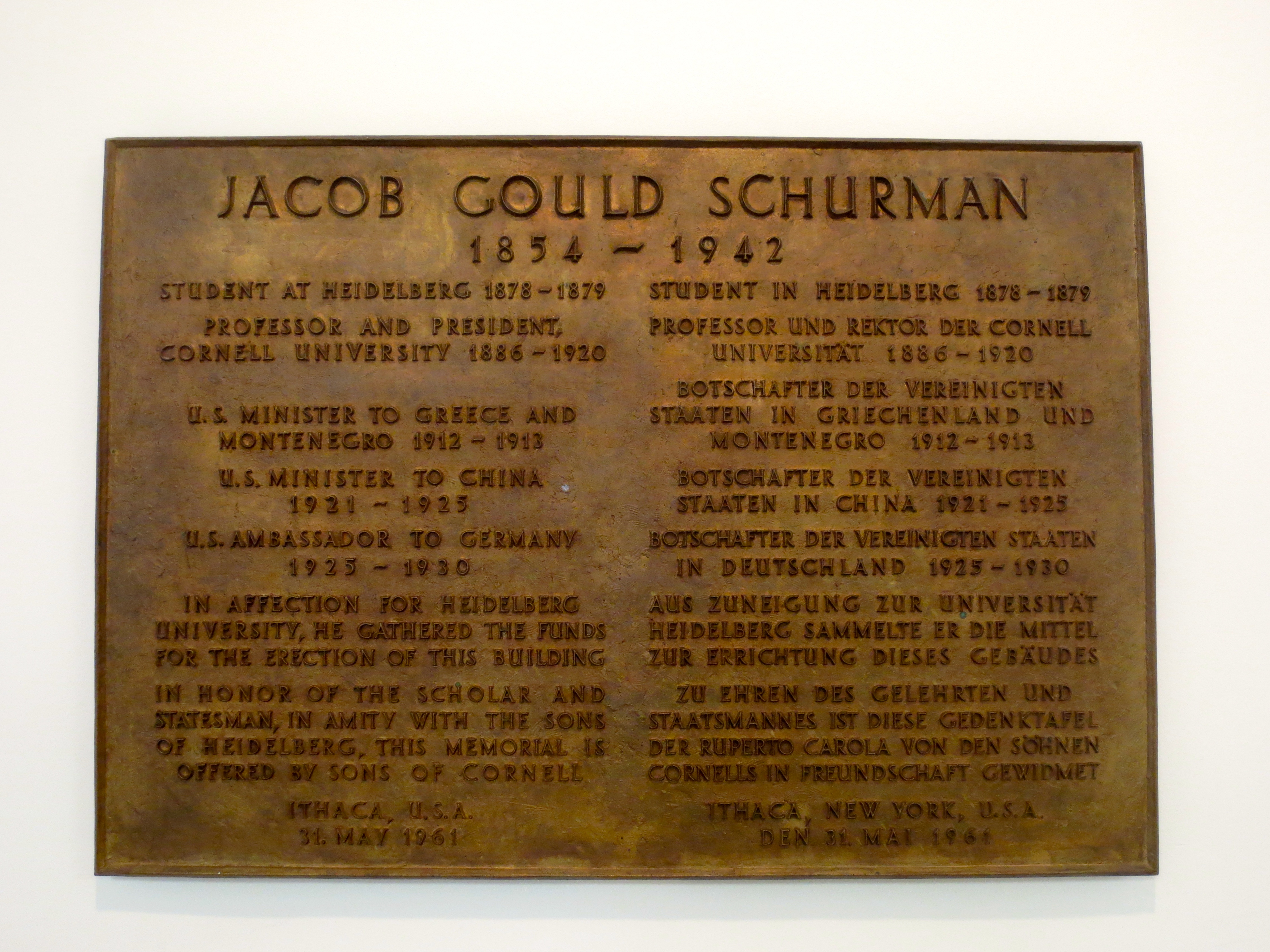 Zu Ehren des Gelehrten und Staatsmannes Jacob Gould Schurman ist diese Gedenktafel von den Söhnen ihrer Alma Mater Cornell University in Freundschaft den Söhnen der Ruperto Carola gewidmet, die Gedenktafel befindet sich in der Neuen Universität Heidelberg